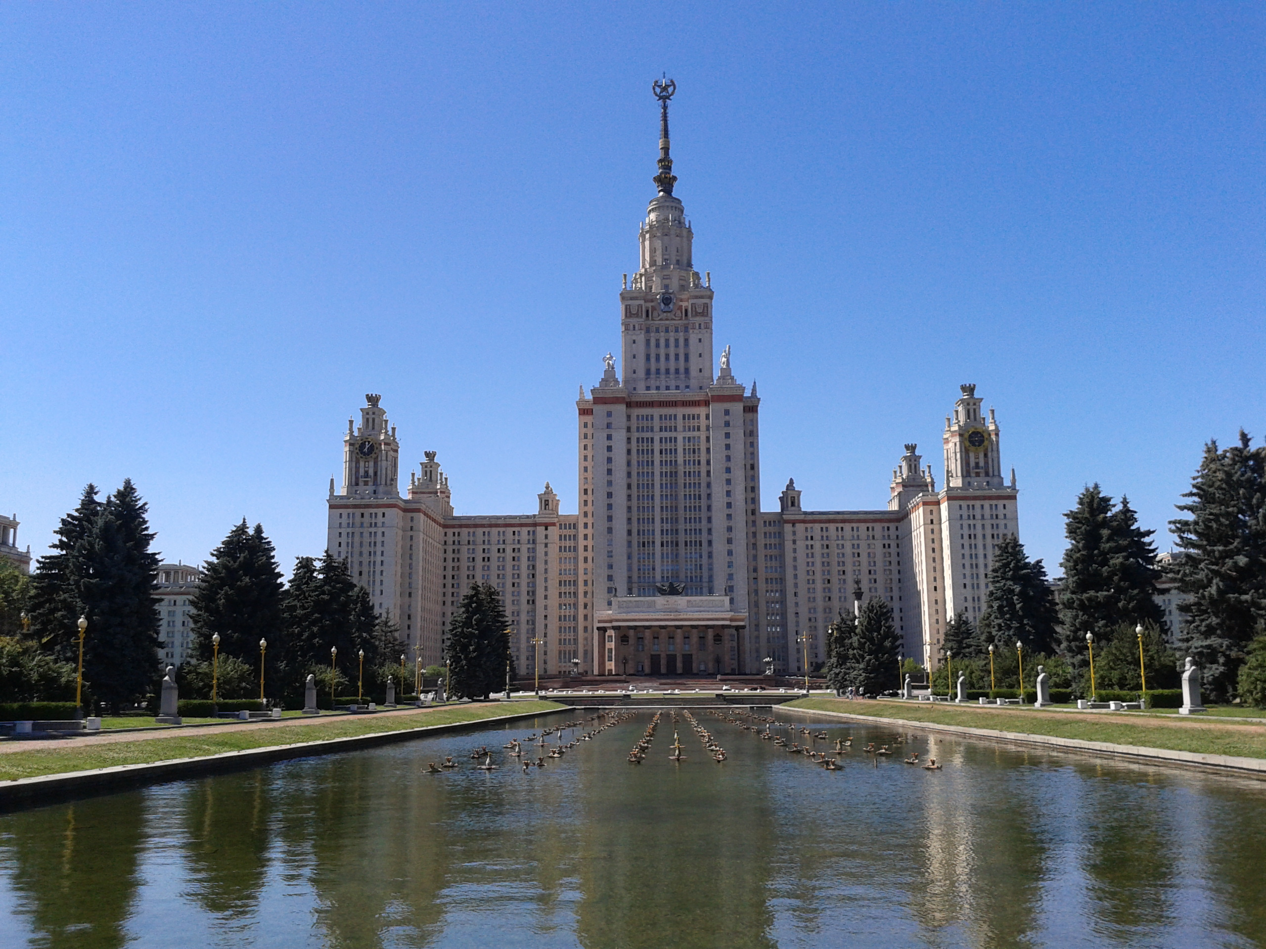 Главное здание Московского государственного университета им. М. В. Ломоносова, Воробьёвы горы